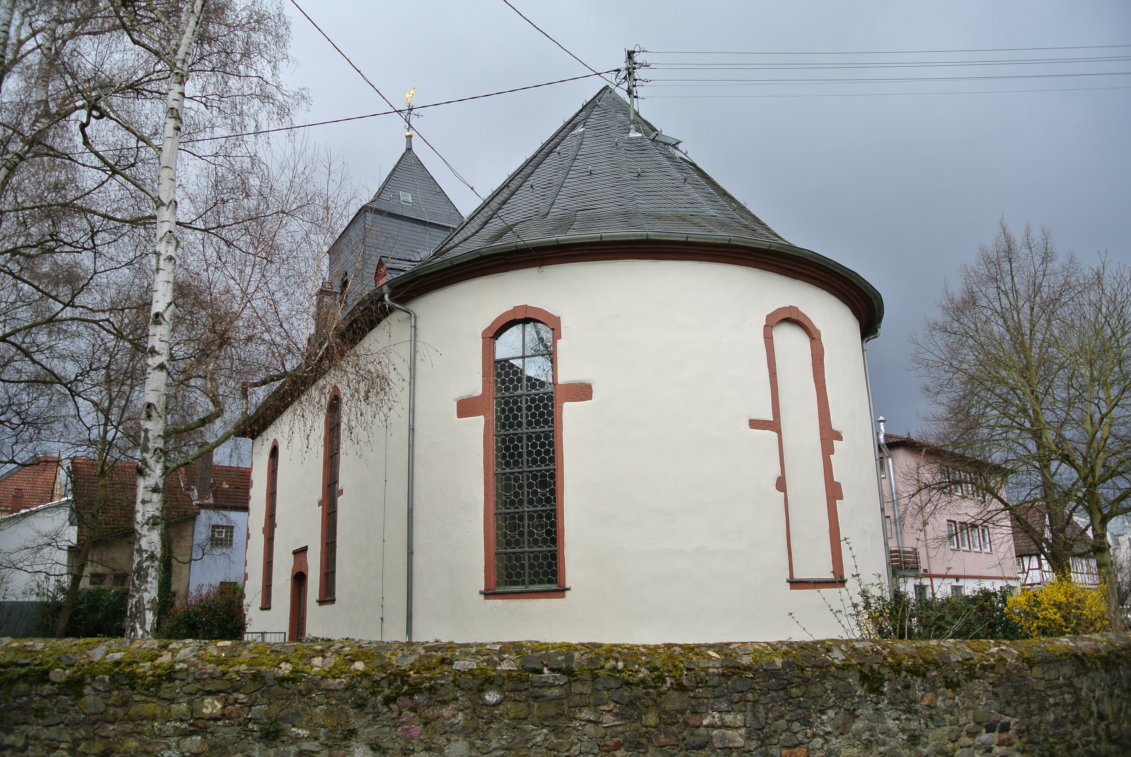 Evangelische Pfarrkirche in Frankfurt Nieder-Eschbach, Deuil-La-Barre-Straße 74; Bauzeiten 1617-1618, 1765-1766, 1965-1966; Baumeister: Konrad Roßbach und Christian Ludwig Hermann; Baudenkmal